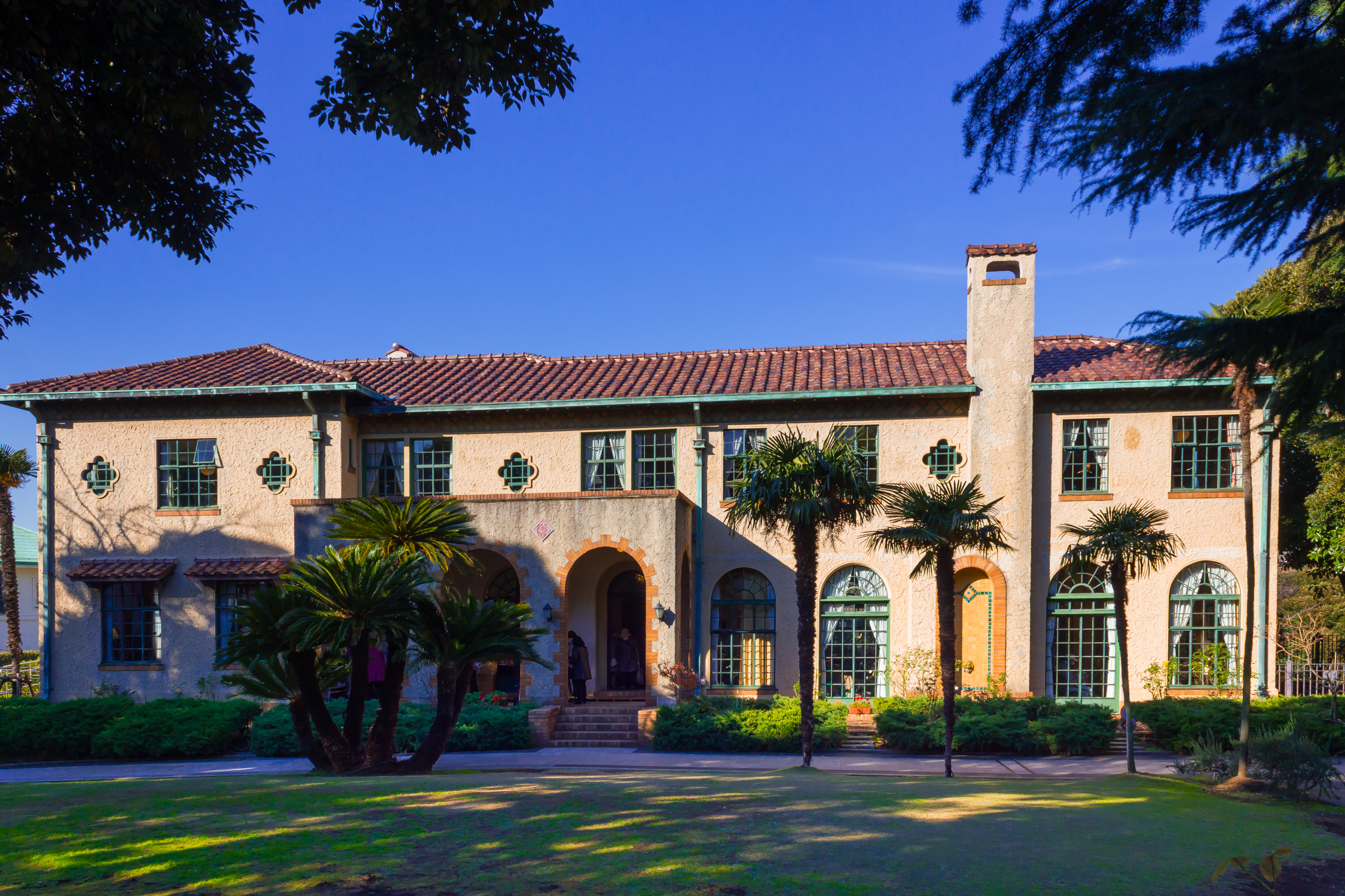 ベーリック・ホール (旧ベーリック邸) - 1930年竣工。J・H・モーガン。横浜市認定歴史的建造物。横浜市中区山手町。